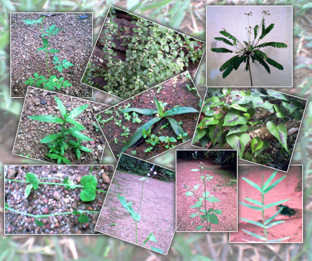 ദശപുഷ്പങ്ങളുടെ ചിത്രം സ്വയം എടുത്തത്